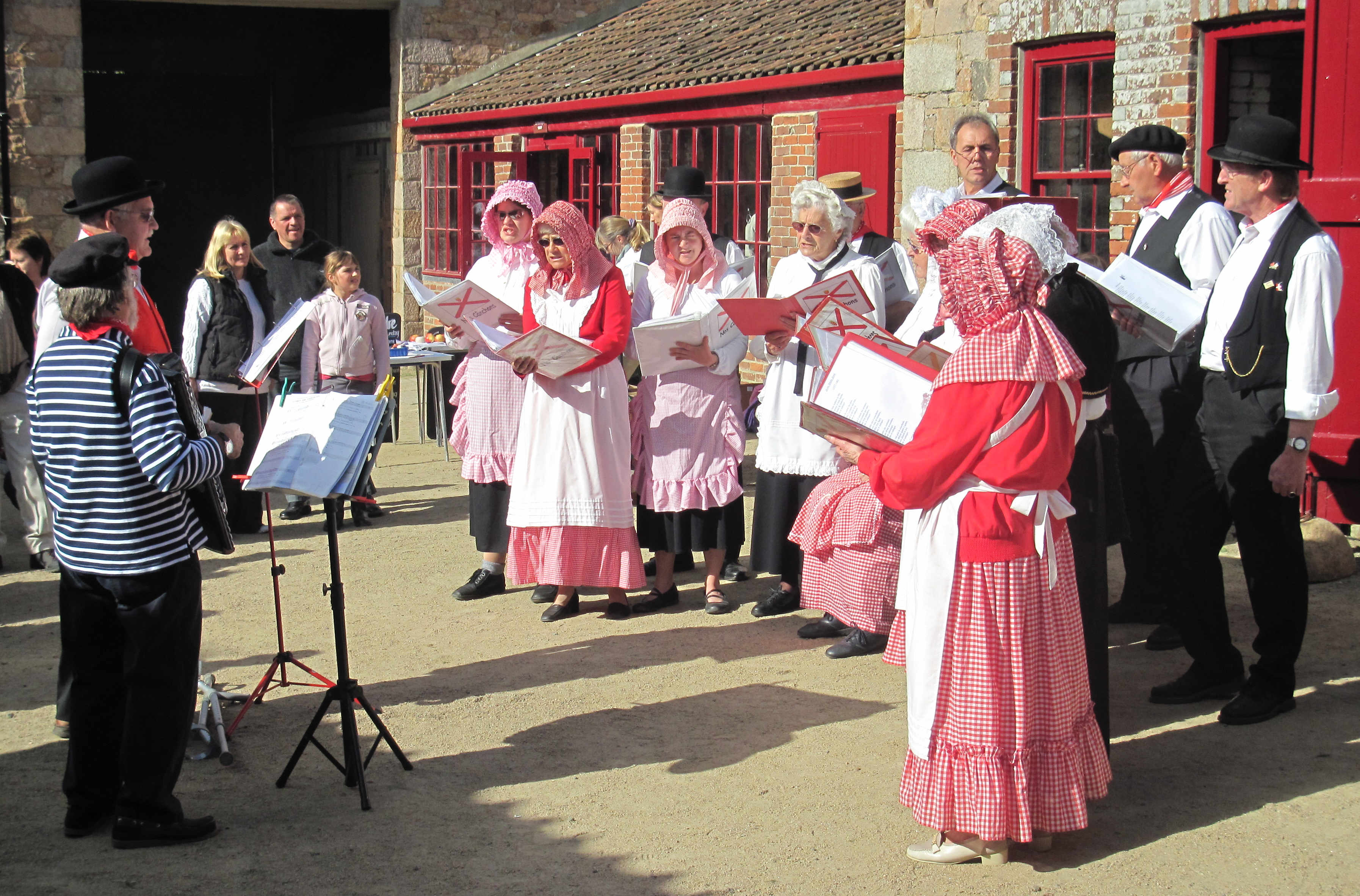 Nrf: Faîs'sie d'Cidre, 16 d'Octobre 2010, Jèrri